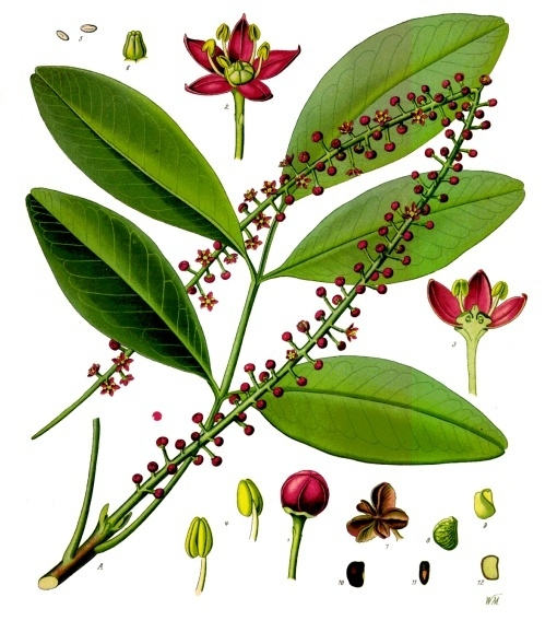 Paraguay-Jaborandi. A blühendes Zweigstück in natürl. Grösse; 1 Blüthenknospe, vergrössert; 2 Blüthe, desgl.; 3 dieselbe im Längsschnitt, desgl.; 4 Staubgefäss von verschiedenen Seiten, desgl.; 5 Pollen, desgl.; 6 Griffel mit Narbe, desgl.; 7 Frucht, desgl.; 8 einzelnes Fruchtfach, natürl. Grösse; 9 Same mit Samenschale, vergrössert; 10, 11 Samen von verschiedenen Seiten, desgl.; 12 derselbe im Längsschnitt, desgl.